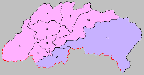 岐阜県吉城郡の町村制時点の町村。